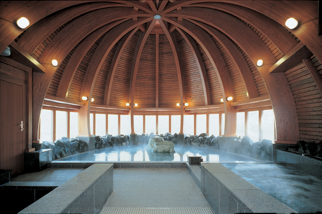 白雲谷温泉ゆぴか